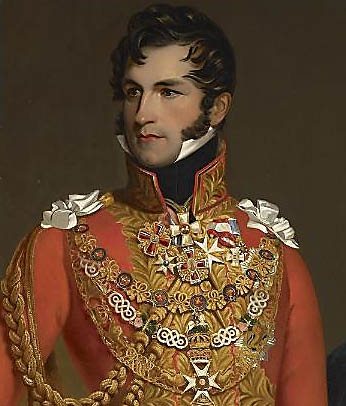 detail